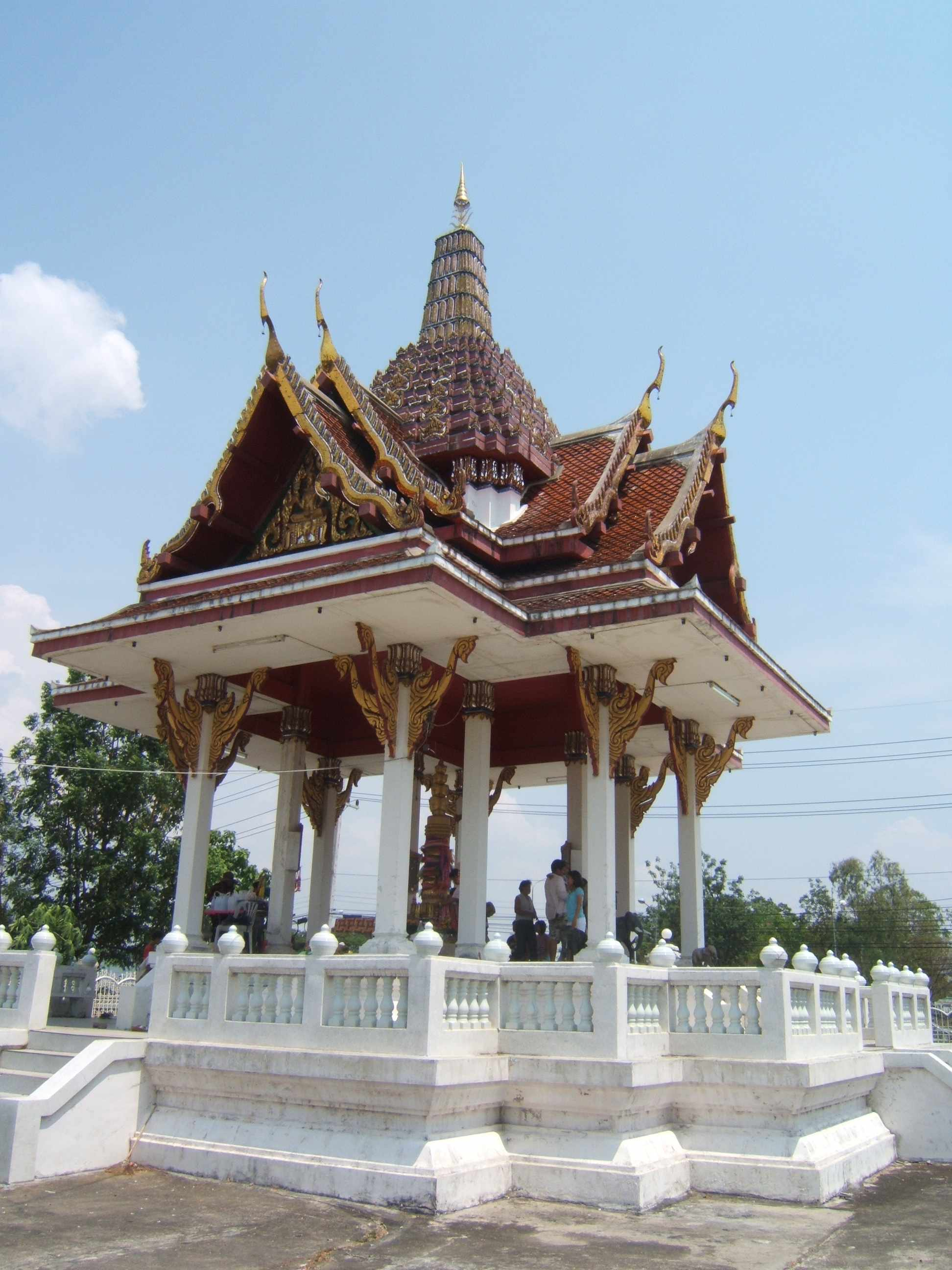 Sao Lak Mueang, Tak, Tak Province, Thailand